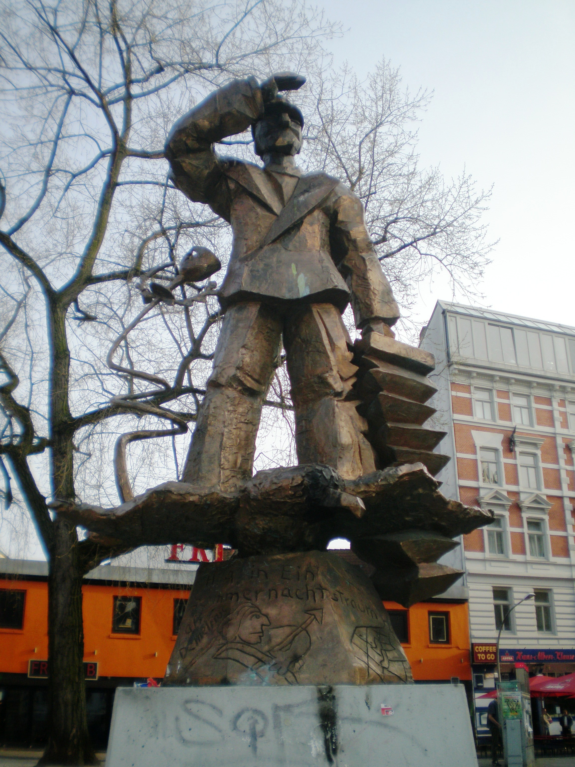 Jörg Immendorff 1986, Hans- Albers-Denkmal (Hans Albers Memorial), Hamburg, Germany